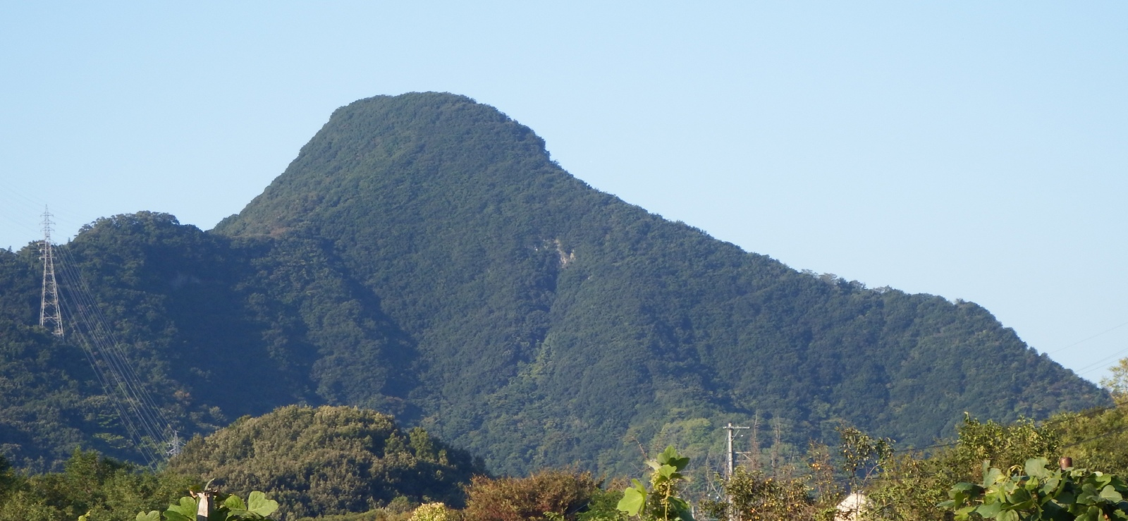 天霧山を南南西から望む。天霧城参照。